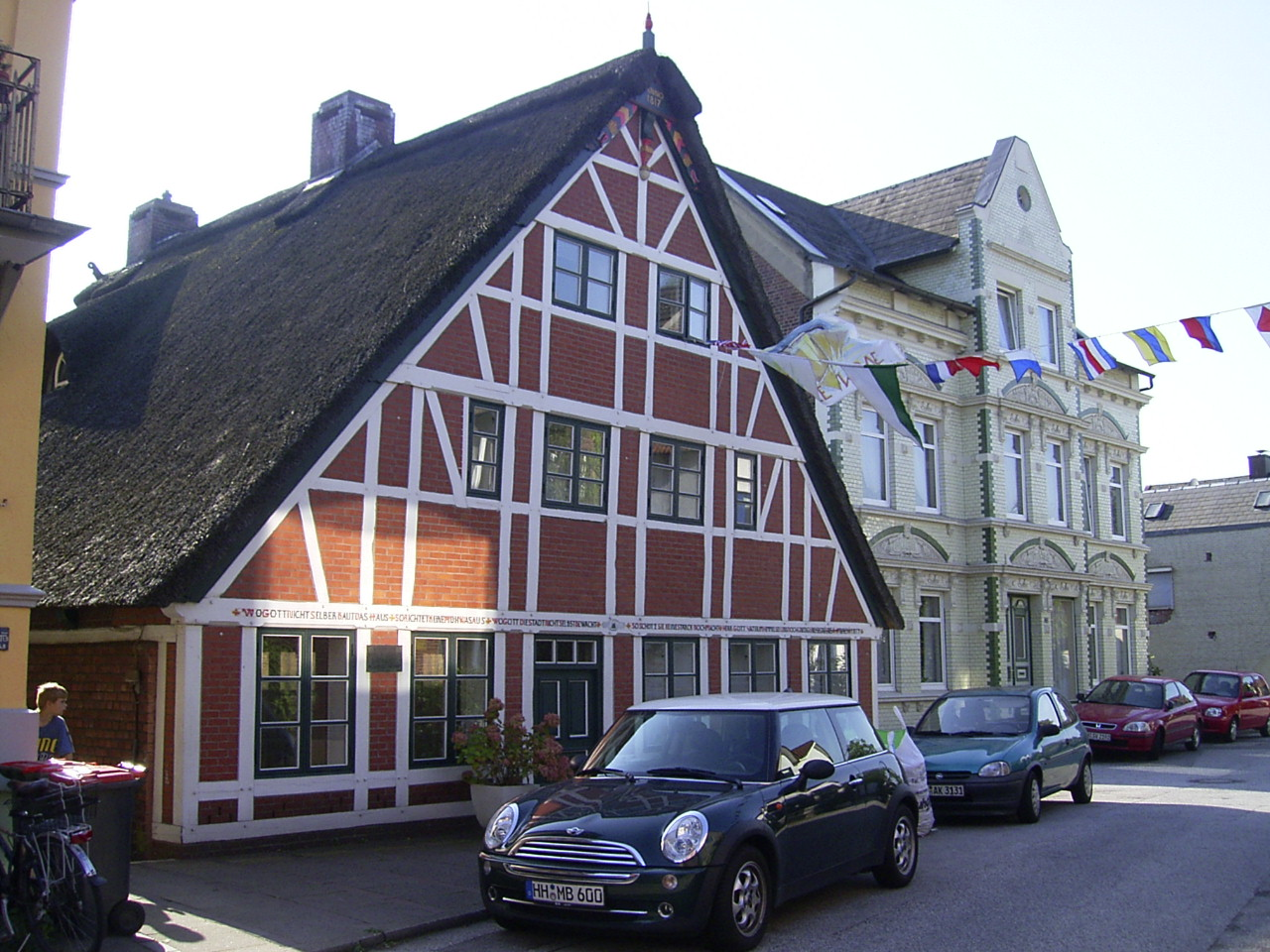 Fachwerkaus von 1817 am Auedeich in Finkenwerder.This is a photograph of an architectural monument.